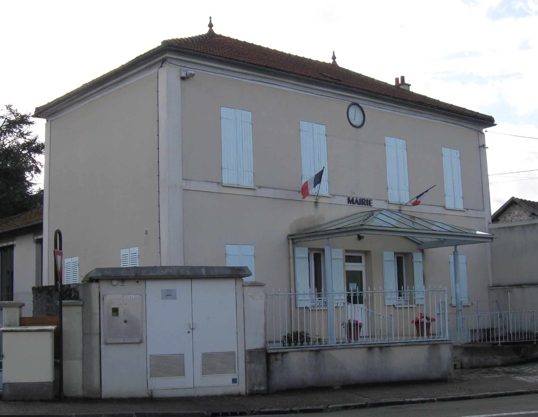 Mairie de Villeneuve-les-Bordes. (Seine-et-Marne, région Île-de-France).